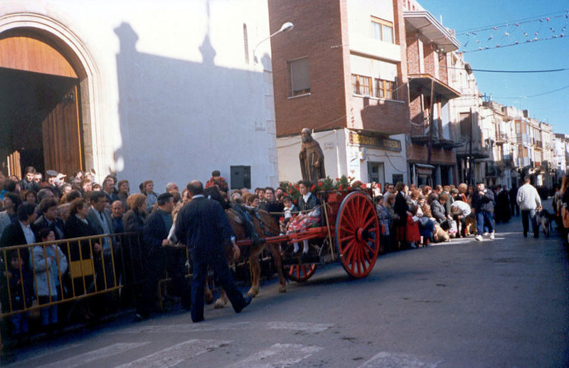 Plaça de l'Alcalde Cid i Cid de Santa Bàrbara el dia de la festa de Sant Antoni de 1994